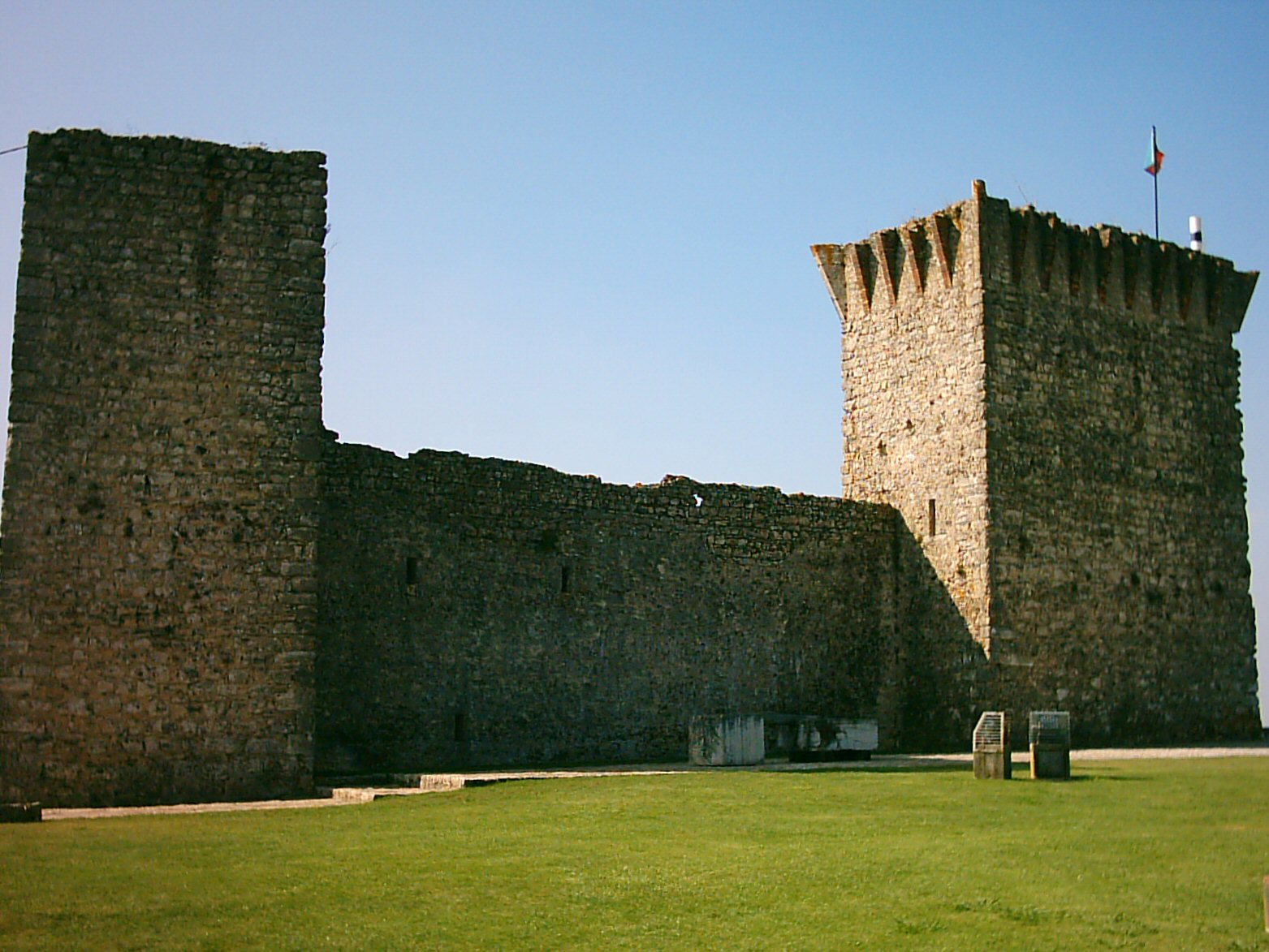 Castelo de Ourém, em Ourém (Portugal)